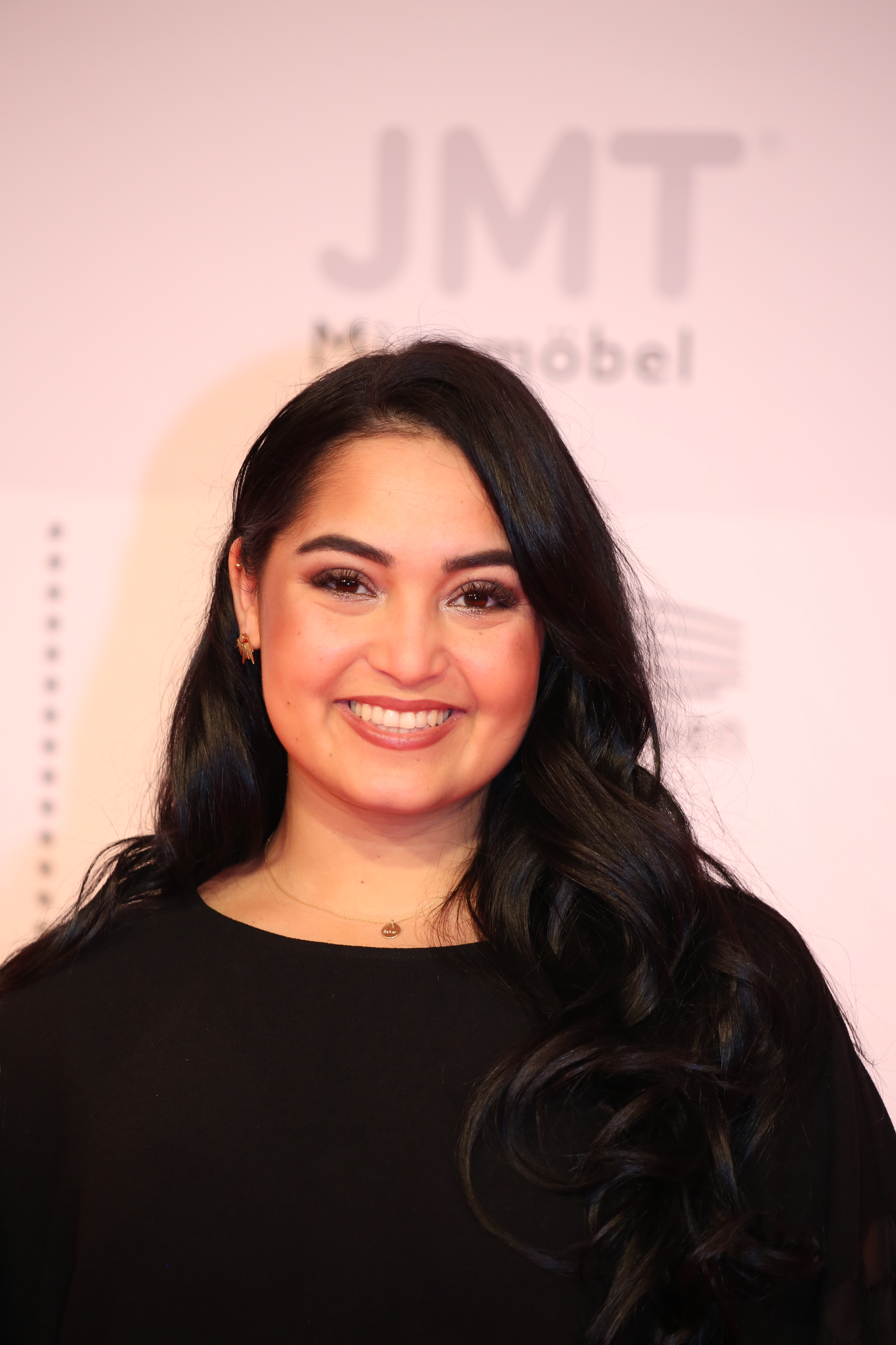 Bahar Kizil bei der Kinderlachen-Gala 2017, in Dortmund.